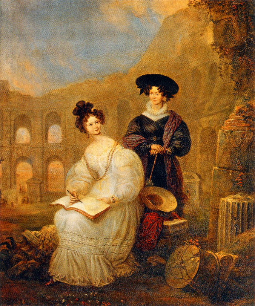 Портрет двух дам в Колизее: Вера Ивановна Хлюстина, ур.Толстая (1783 – 1879) (сестра Ф.И.Толстого-Американеца) и её дочь Анастасия Семёновна Хлюстина (1808-1863), в замужестве графиня де Сиркур.